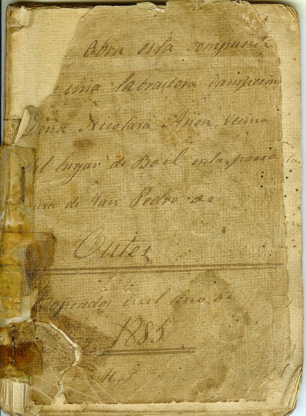 Portada do libro de Nicolasa Añón Paz.